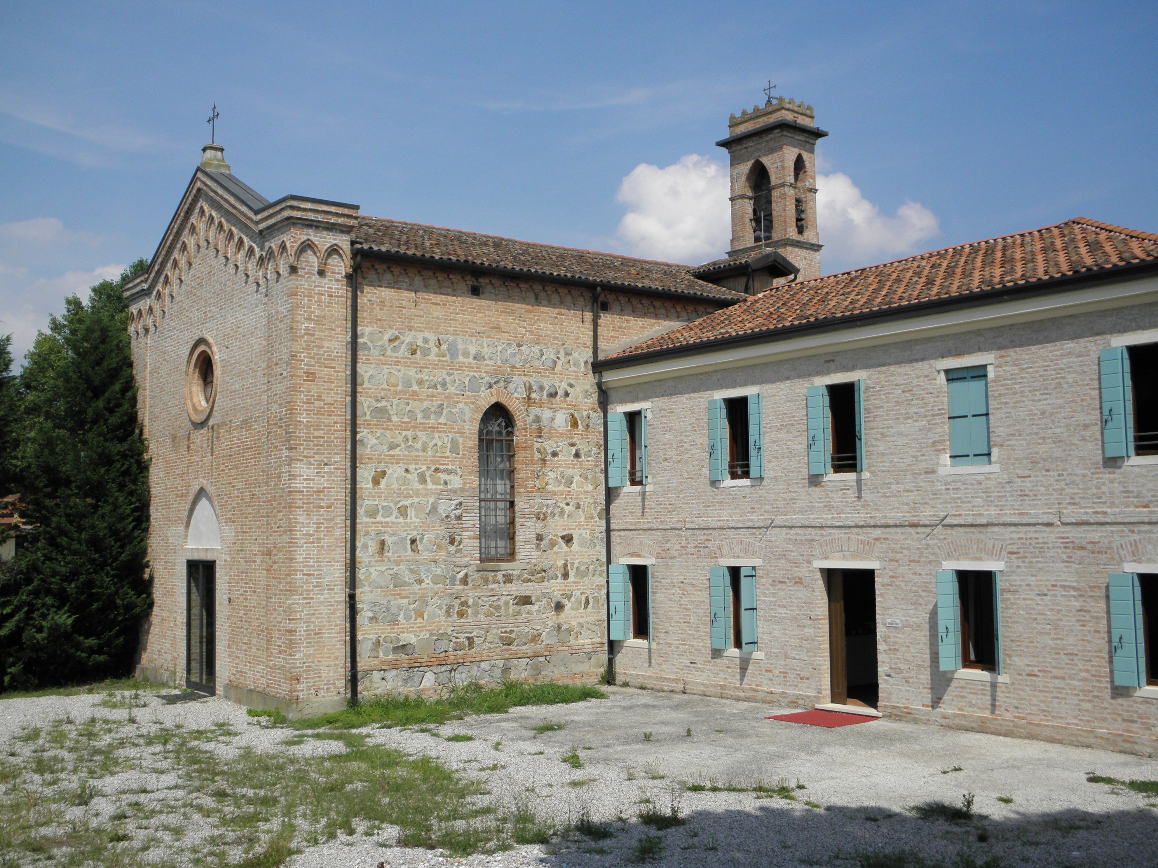 Mandriola, frazione di Albignasego: la precedente chiesa di San Giovanni apostolo ora sconsacrata e ridesignata sala don Lorenzo Milani.